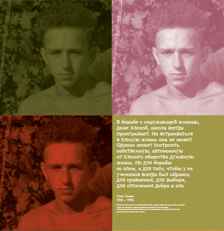 арт-коллажи